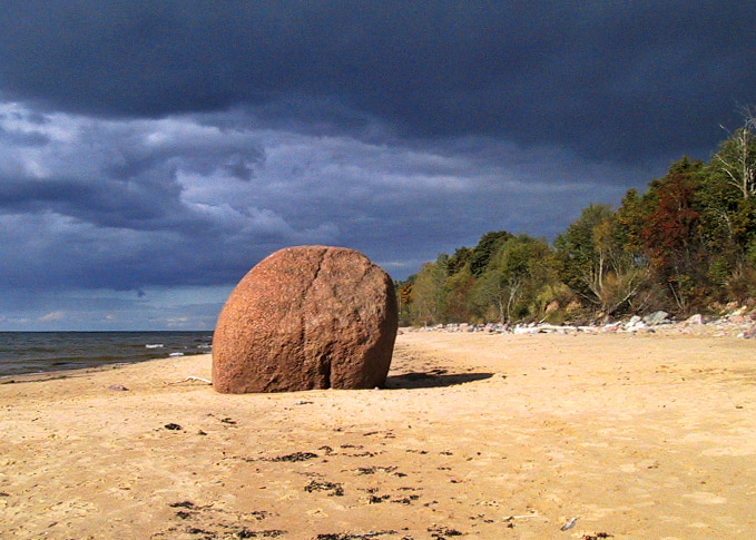 Lauci Stone in Vidzeme Beach, Latvia